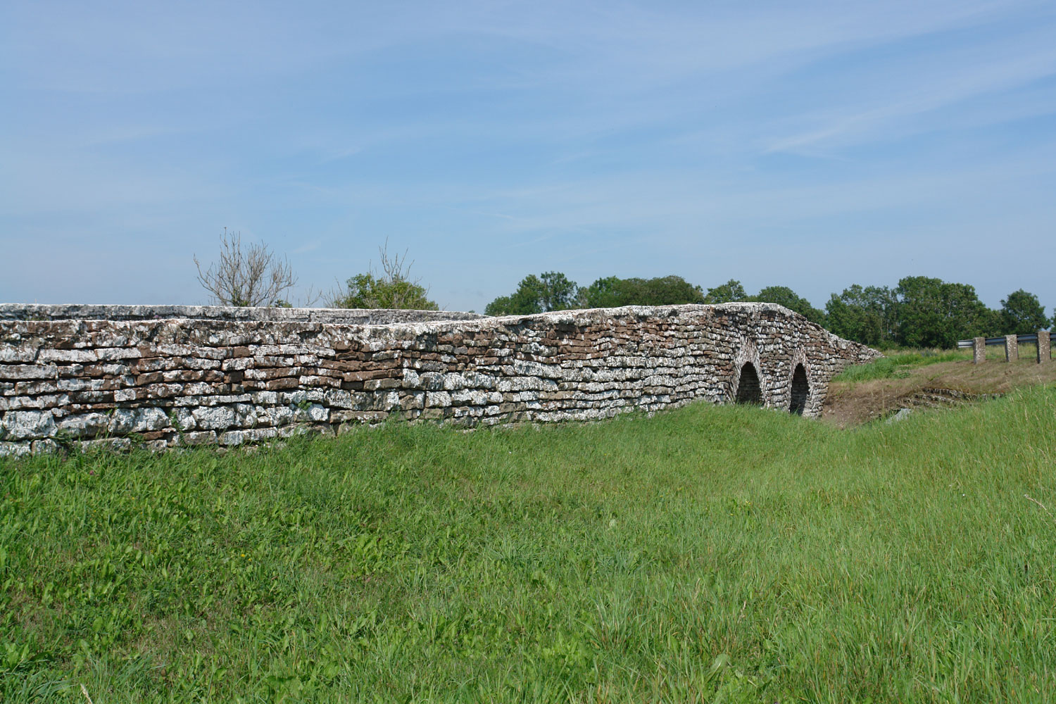 Brücke Södra Kvinneby auf Öland. Die Brücke wurde 1790 auf Initiative des Landeshauptmann Carl Rappes gebaut und im 20. Jh. verbreitert